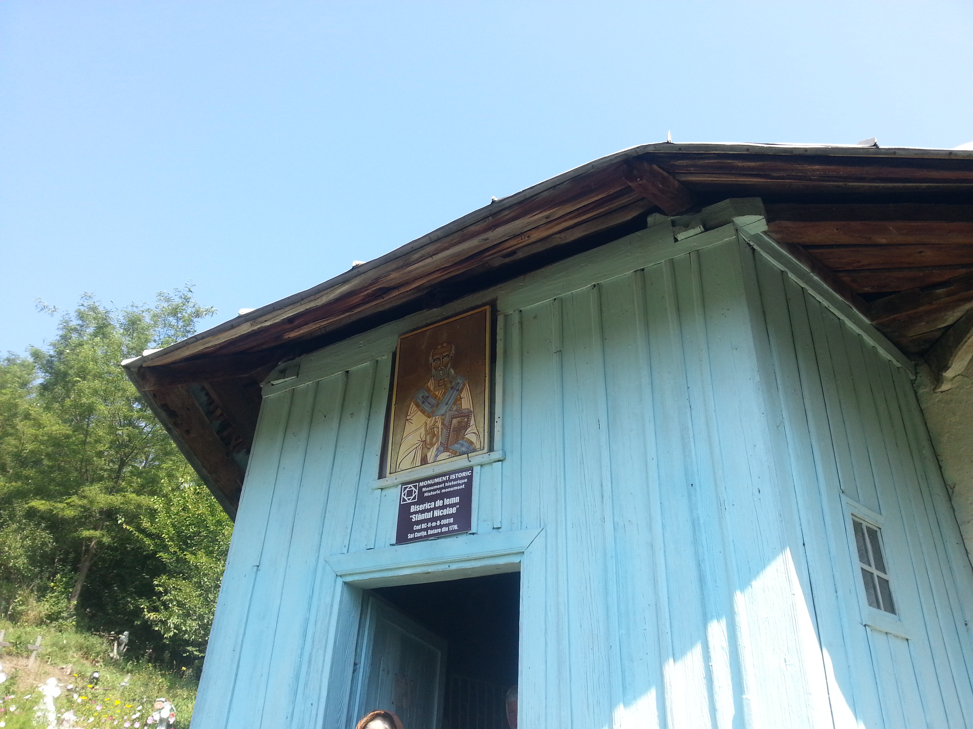 Biserica din Satul Curita . poza realizata la data de 10-08-2014 , eram cu bicicleta in vizita la locu de veci a rudelor mele din partea mamei.